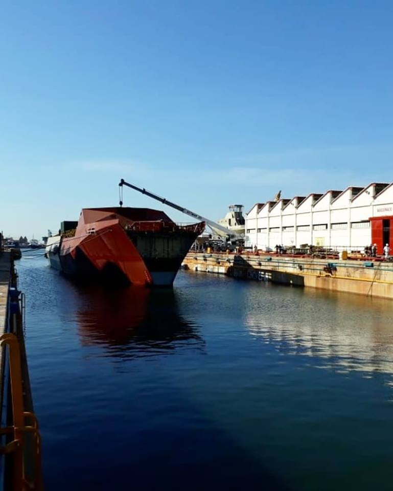 Patrullera Oceanica de Largo Alcance Mexico POLA Armada de mexico